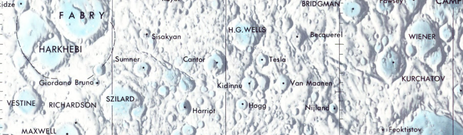 Cráter lunar Cantor. Localización. (Lunar Chart LPC1. Second Edition)